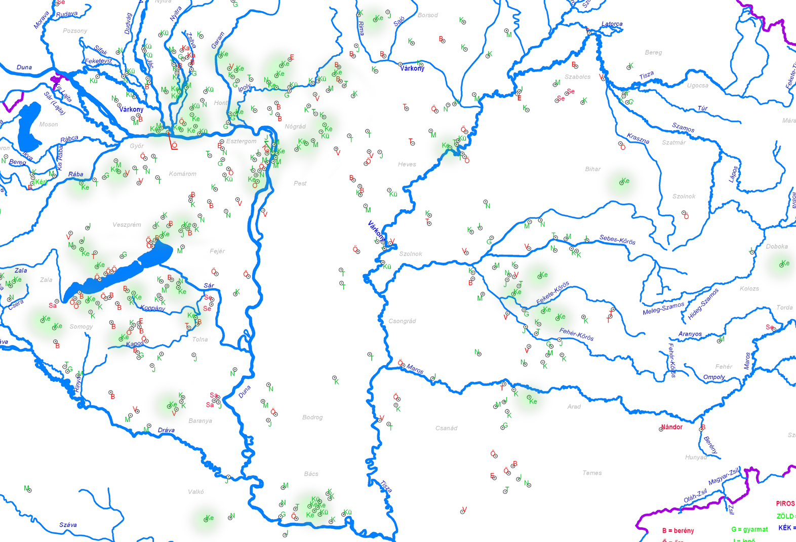 A keszi törzsnév elterjedése a Kárpát-medencében